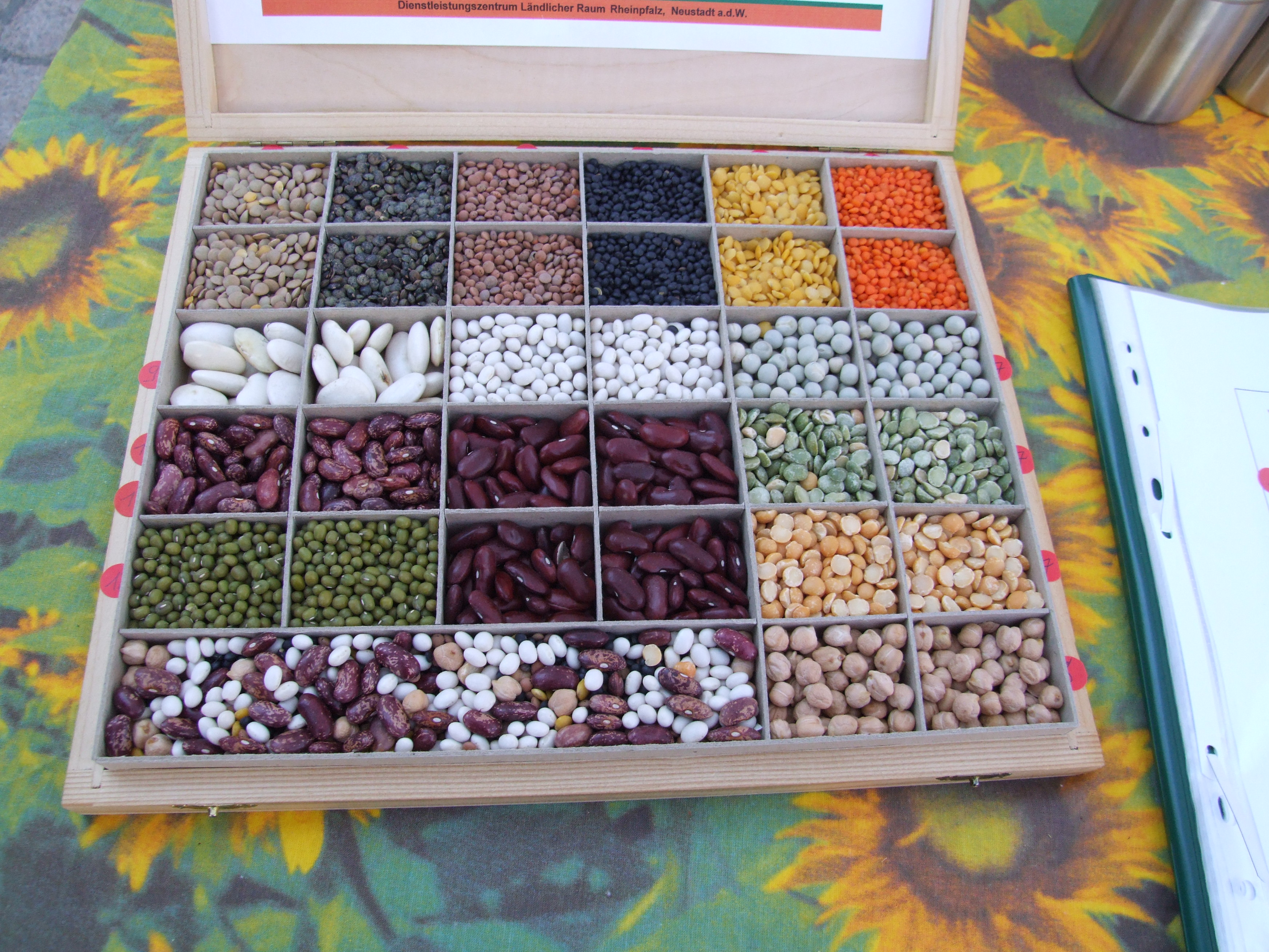 Hülsenfrüchte, Sammlung des Dienstleistungszentrums ländlicher Raum, Neustadt a.d.W. fotographiert auf dem Bauernmarkt 2007 in Speyer; en: legumes obere Reihe von links nach rechts: 1. Tellerlinsen, 2. Puy-Linsen aus der Auvergne, 3. Berglinsen, 4. Beluga-Linsen, 5. Gelbe Linsen, 6. Rote Linsen; zweite Reihe dito; 7. Erbsensorten , 8. Kichererbsen, 9. Bohnen